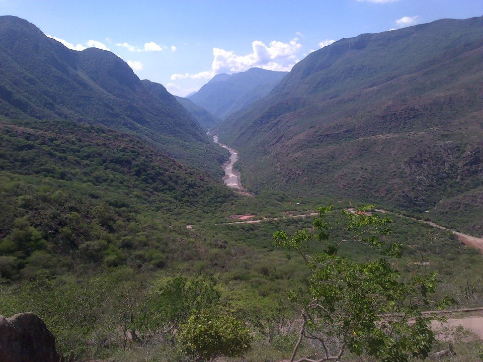 Esta fotografía fue tomada en el municipio colombiano con código 68895.